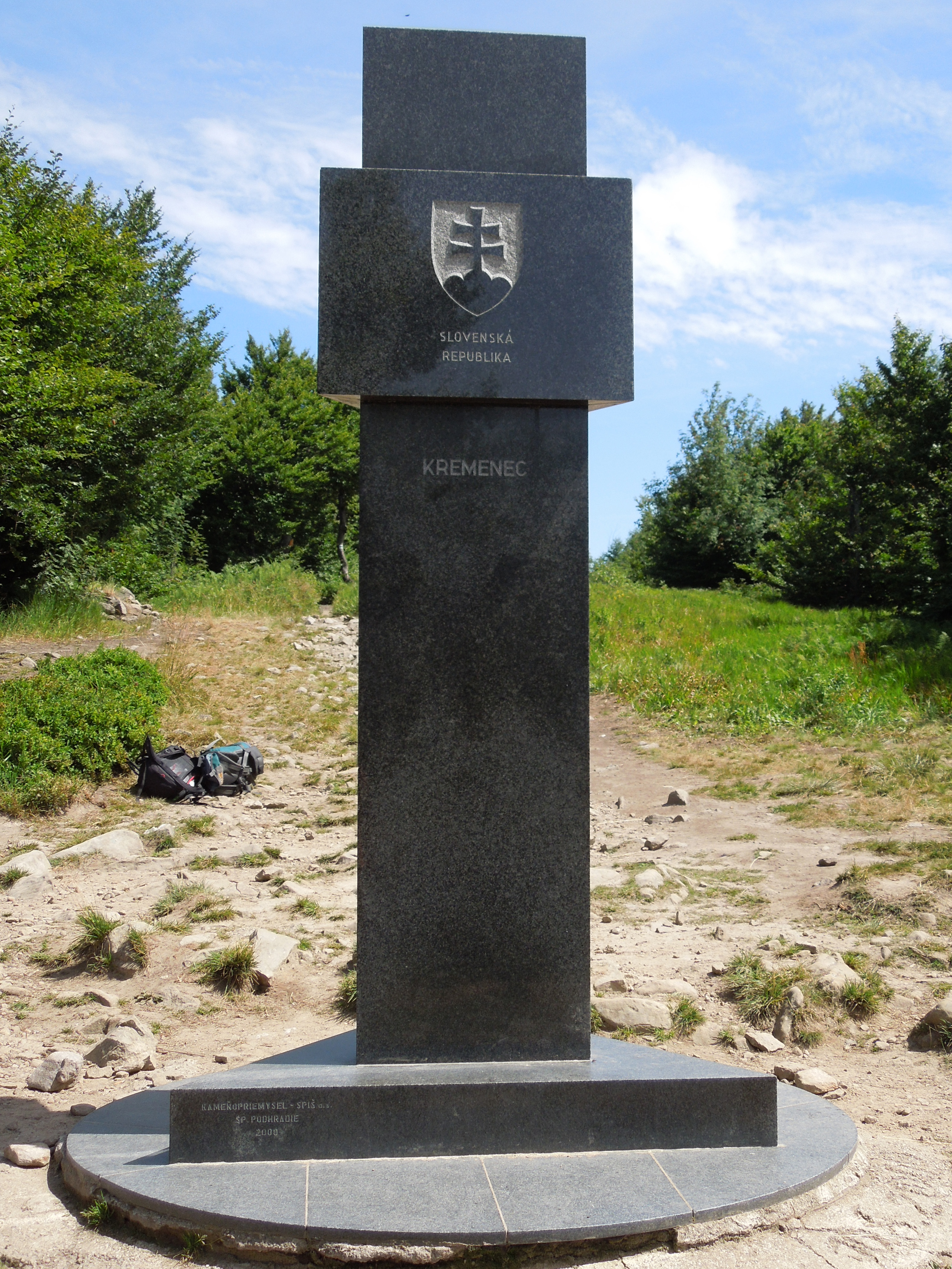 Hraničný stĺp na vrchu Kremenec, vyrobený v roku 2000 spoločnosťou KAMEŇOPRIEMYSEL - Spiš a.s. Spišské Podhradie